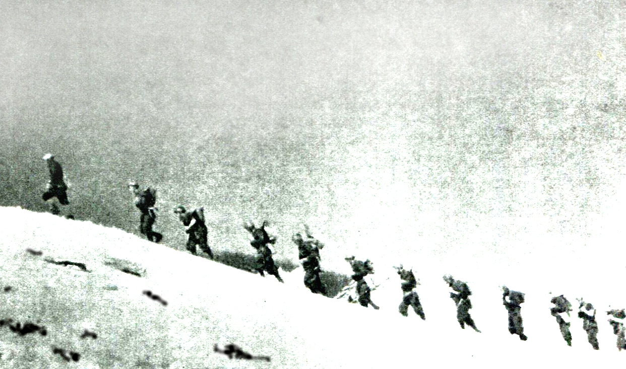 "I trecento della Settima" (Baffico, 1943)- immagine di scena